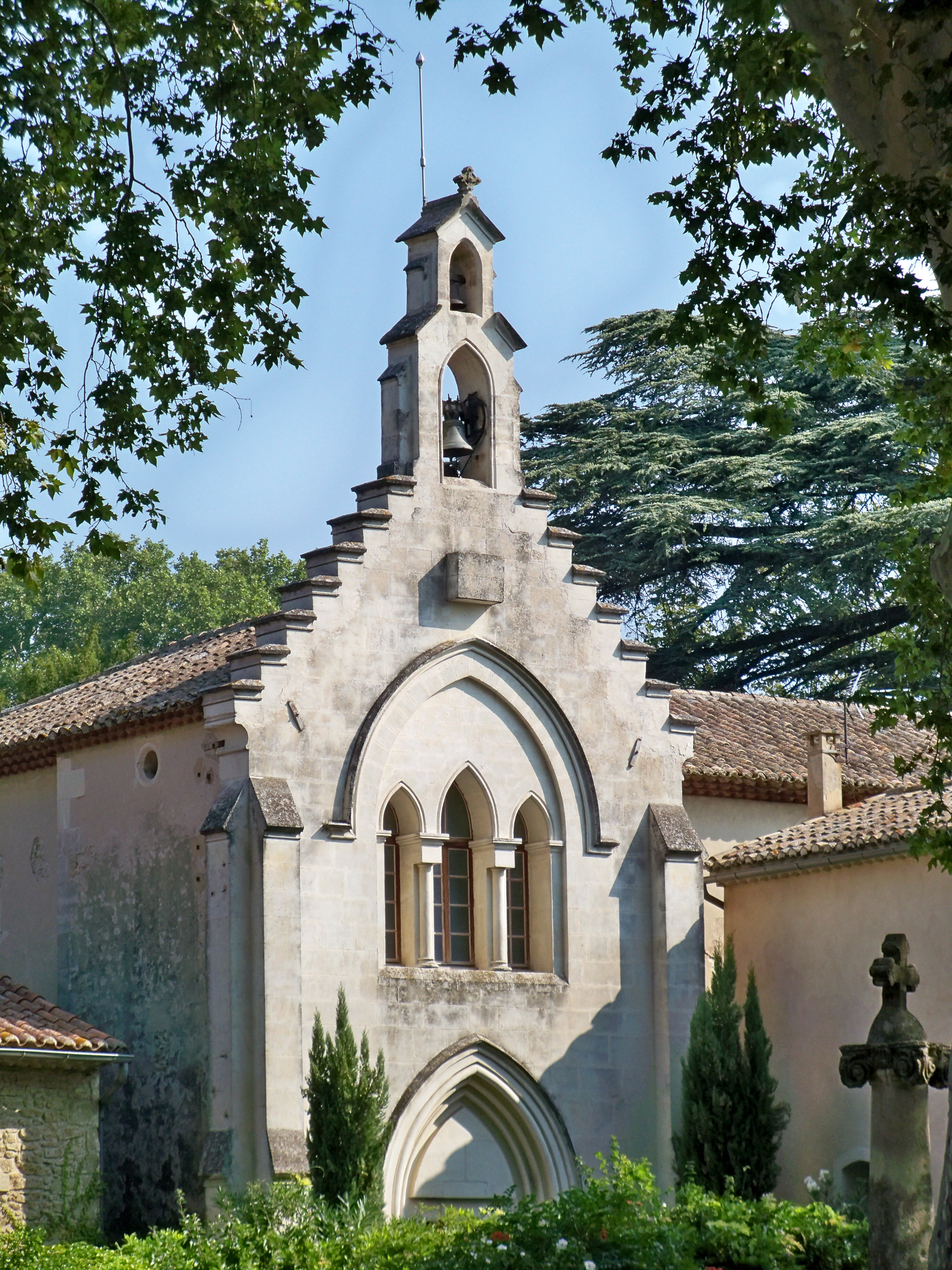 Terre de Causanscommuns, église, presbytère, cour, jardin, parc, clôture, portail, maison, élévation, Route de Violès (Inscrit, 1997) : église .